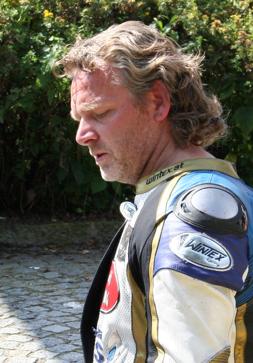 Klaus Klaffenböck beim Oldtimer Grand Prix in Schwanenstadt, Oberösterreich, am 7. September 2014